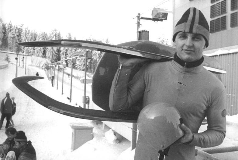 Jens Müller ADN-ZB Schaar 28.11.1987-Österreich: Führung durch J. Müller-Vizeweltmeister Jens Müller (ASK Vorwärts Oberhof, Foto von einem früheren Wettkampf) übernahm zum Auftakt der 10. Internationalen Zwei-Bahnen-Tournee im Rennschlittensport in Innsbruck-Igls nach dem ersten Lauf mit 51,691 s die Führung.